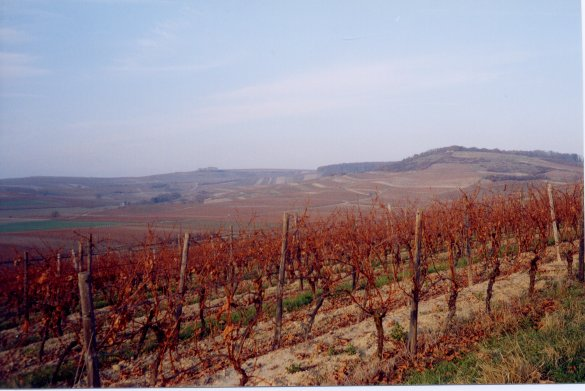 Zotzenheimer Horn im Herbst